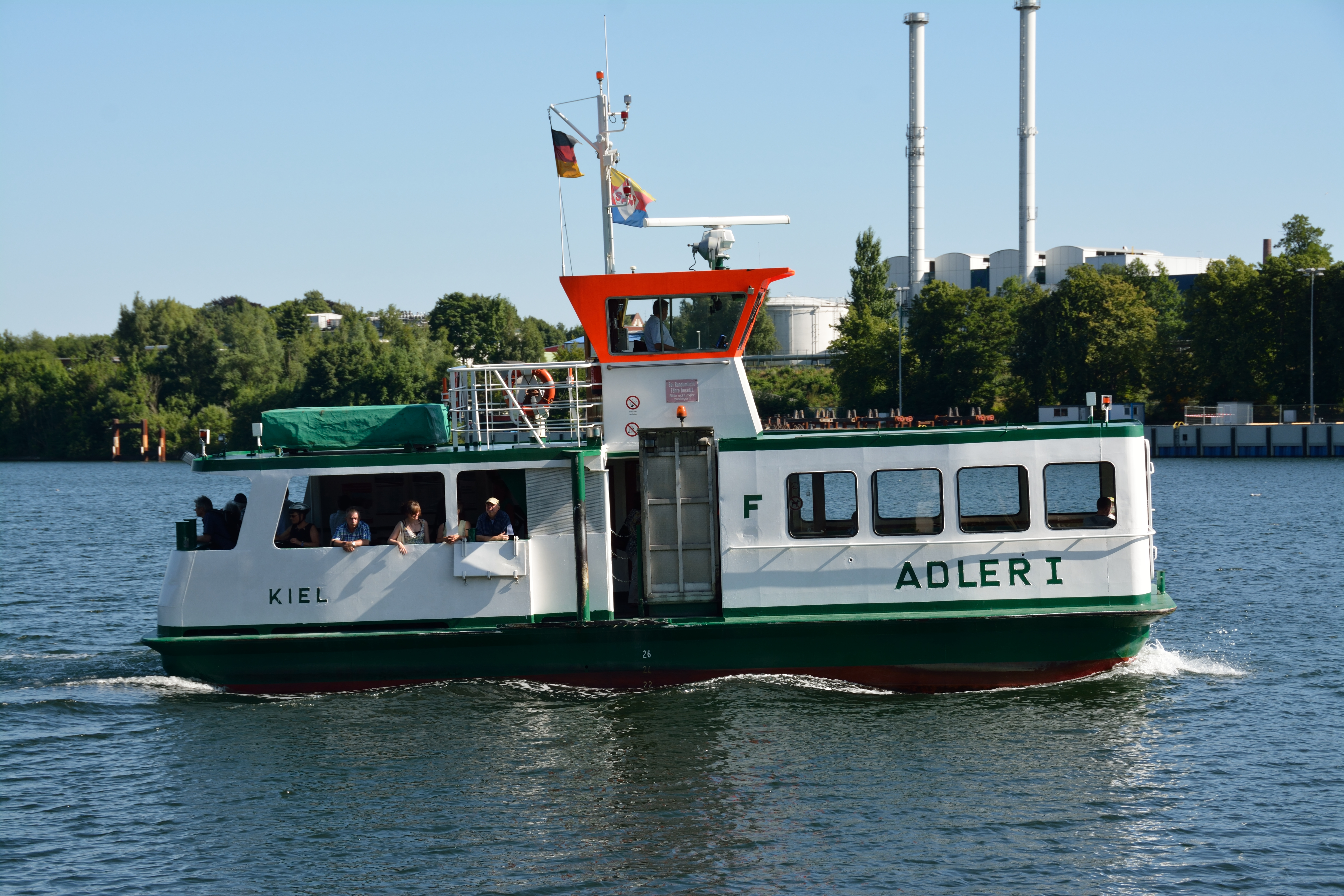 Impressionen vom Besuch der Fährverbindung in Kiel über den Nord-Ostsee-Kanal.